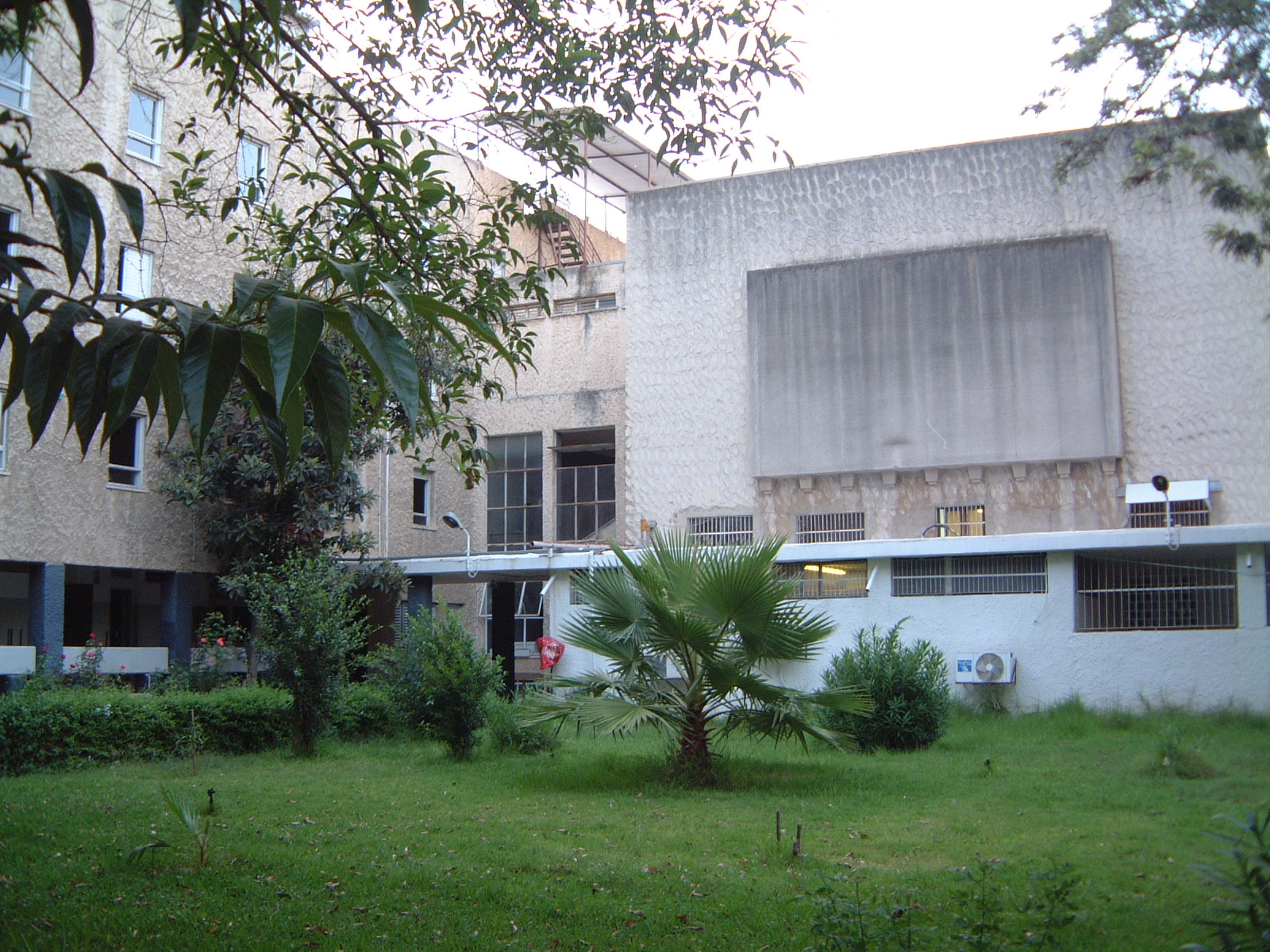 תמונה בחצר ישיבת הרב עמיאל / ישיבת היישוב החדש